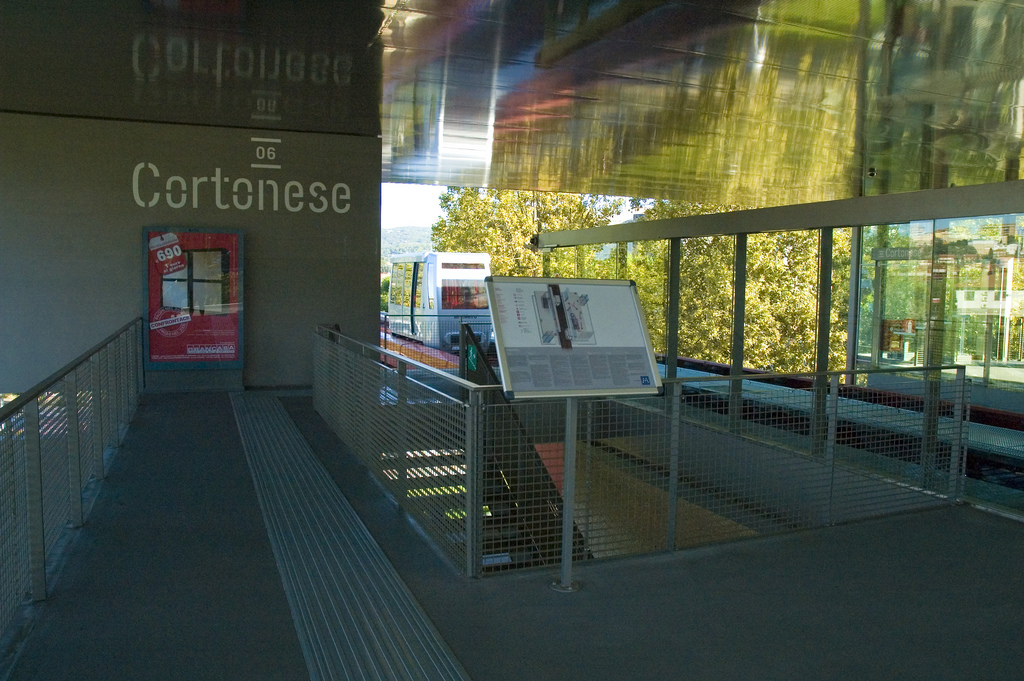 Perugia MiniMetro, fermata Cortonese